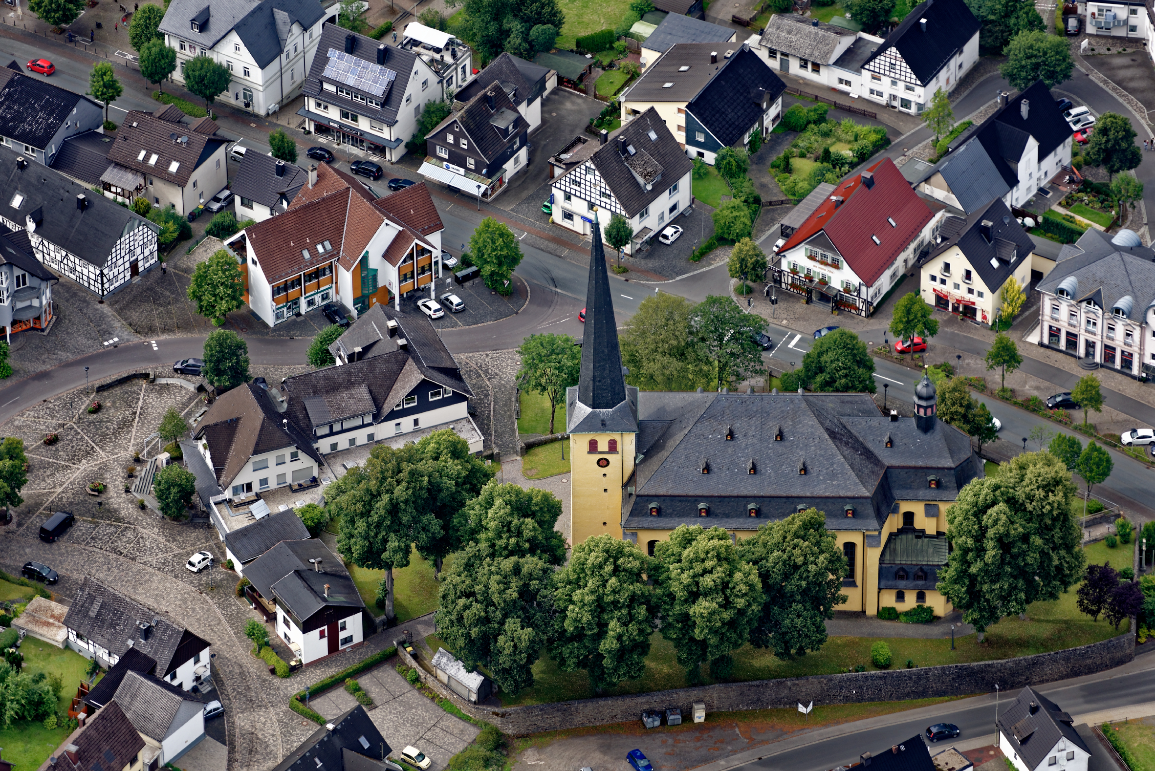 Fotoflug Sauerland West. Katholische Kirche St. Severin in Wenden.